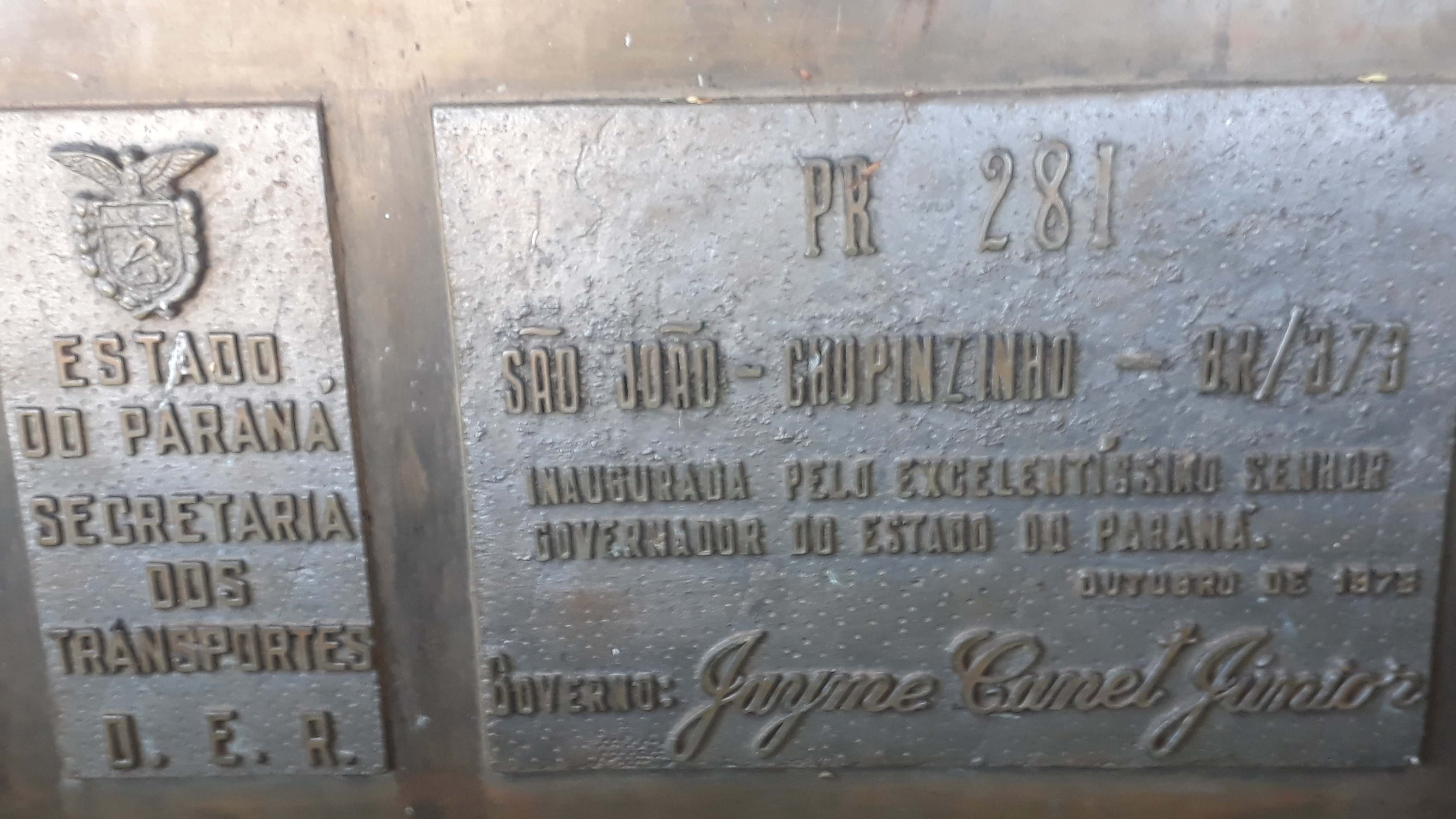 Marco de inauguração de rodovia